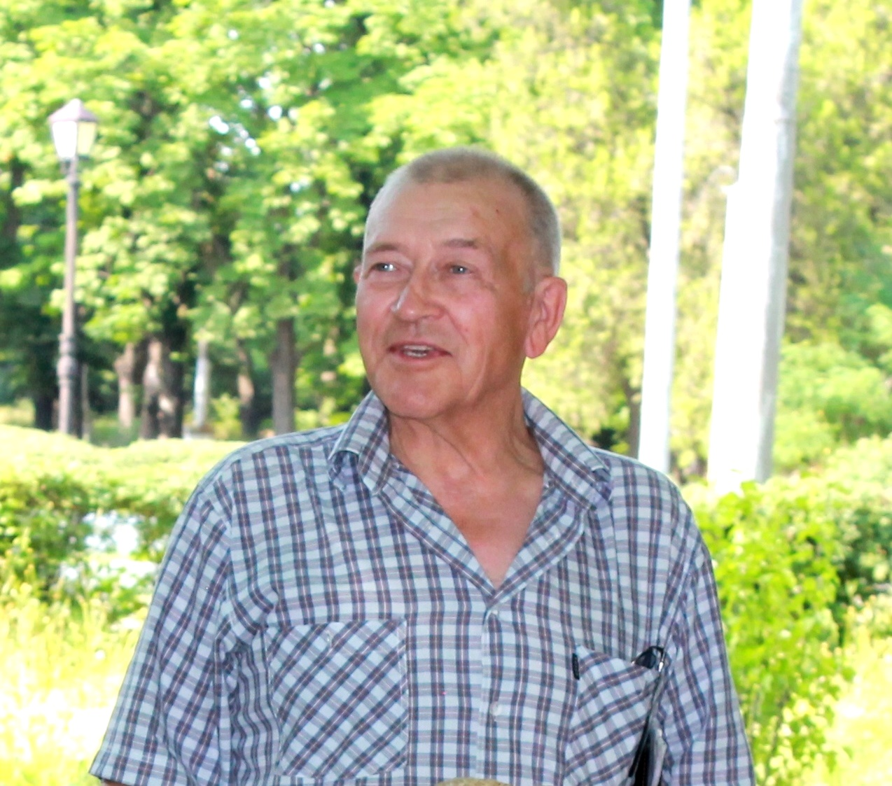 Анатолій Антоненко, голова Марганецького міського літературного об'єднання "Віра"